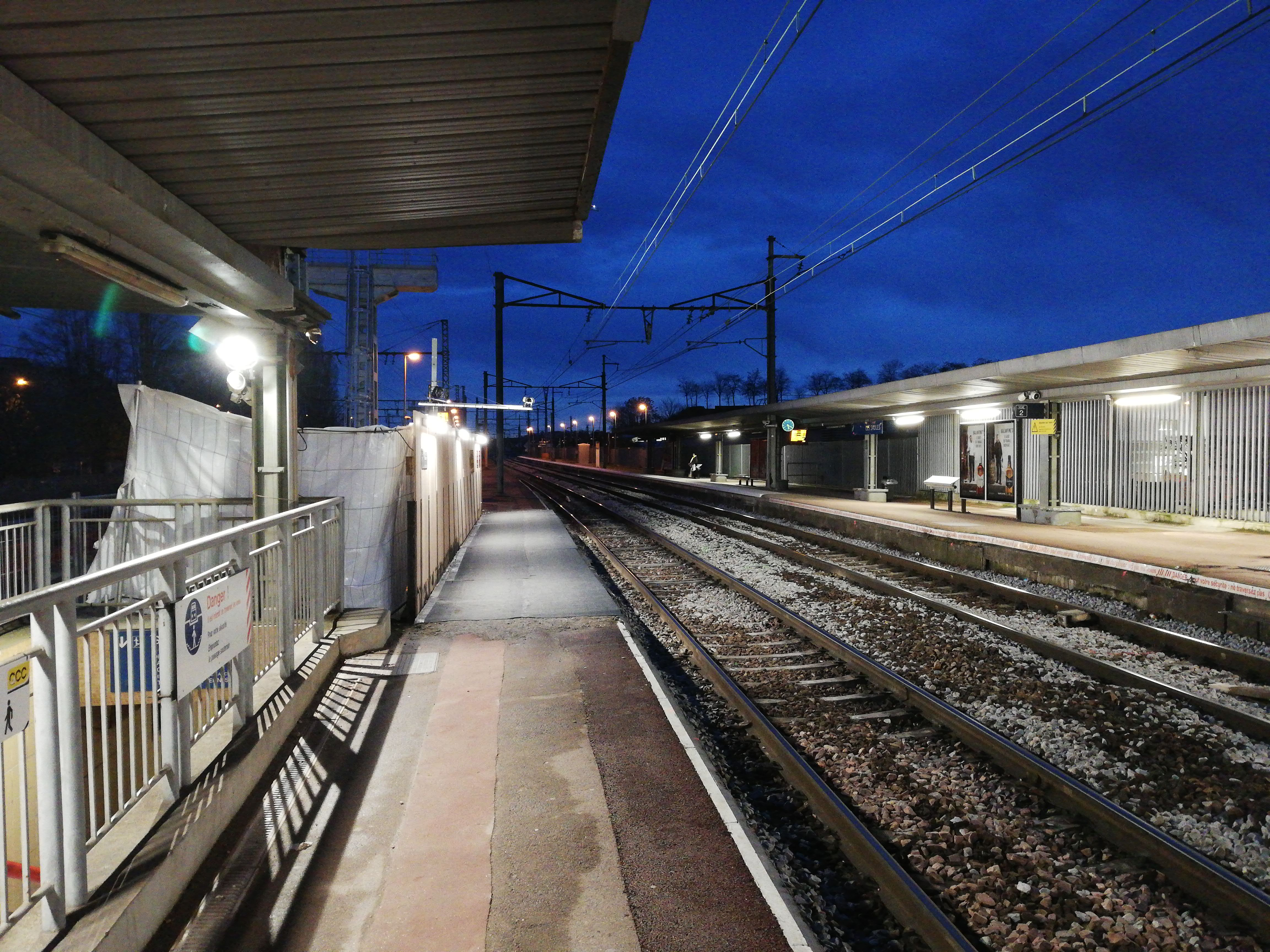 Quais de la gare des Saules, le soir, en 2018.